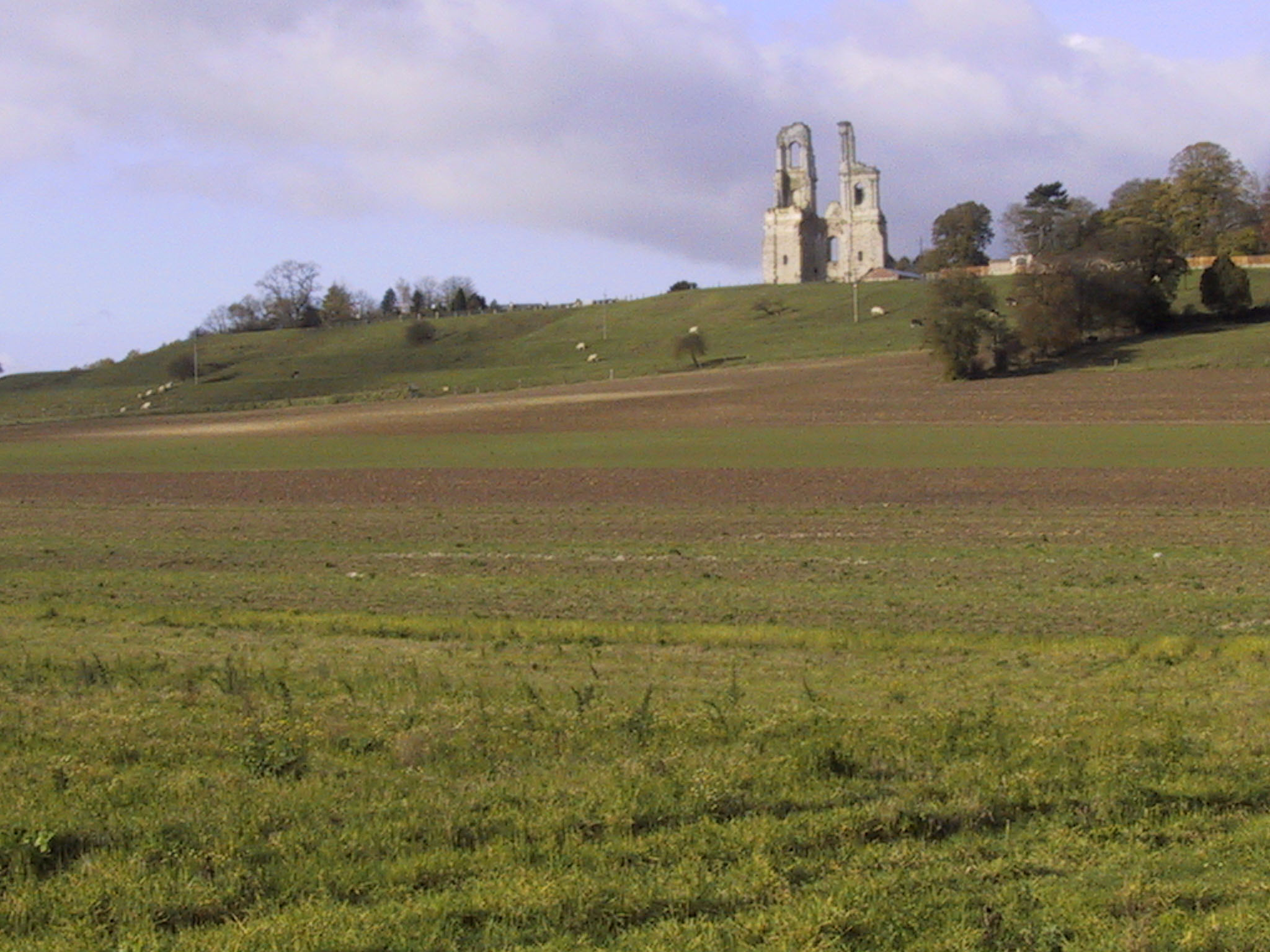 photo personnelle domaine public